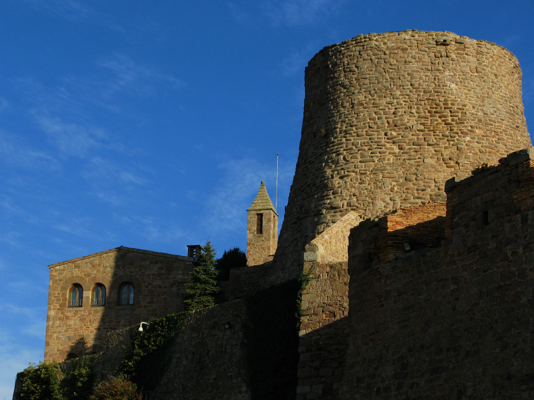 Castell de Cardona